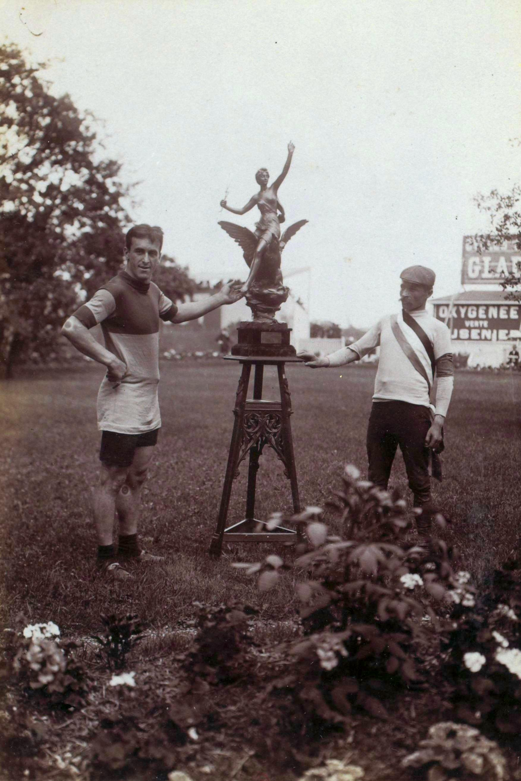 [Collection Jules Beau. Photographie sportive] : T. 22. Année 1903 / Jules Beau : F. 27. [Tour de France, 19 juillet 1903]